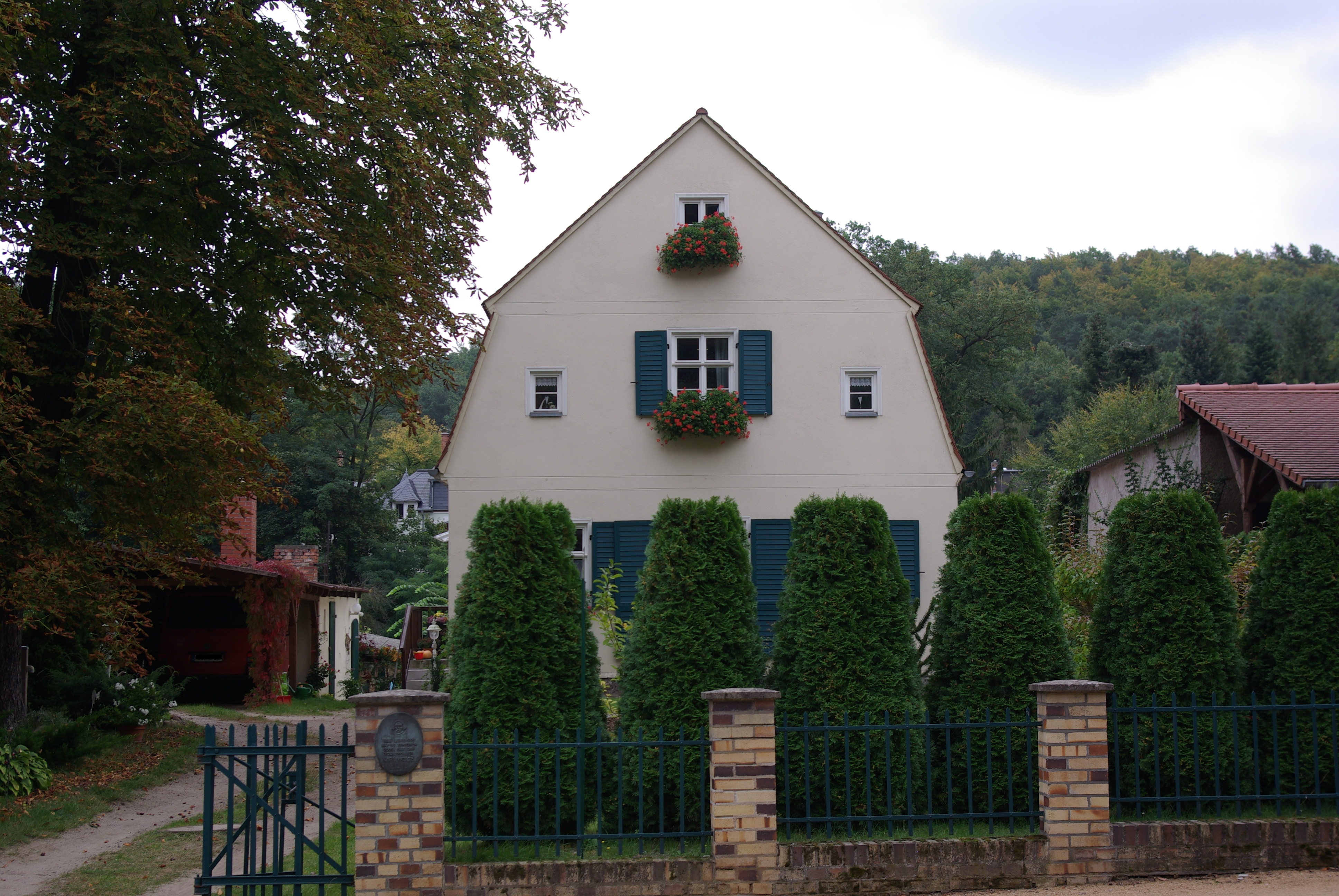 Bad Freienwalde in Brandenburg. Das Haus in der Gesundbrunnenstraße 13 steht unter Denkmalschutz